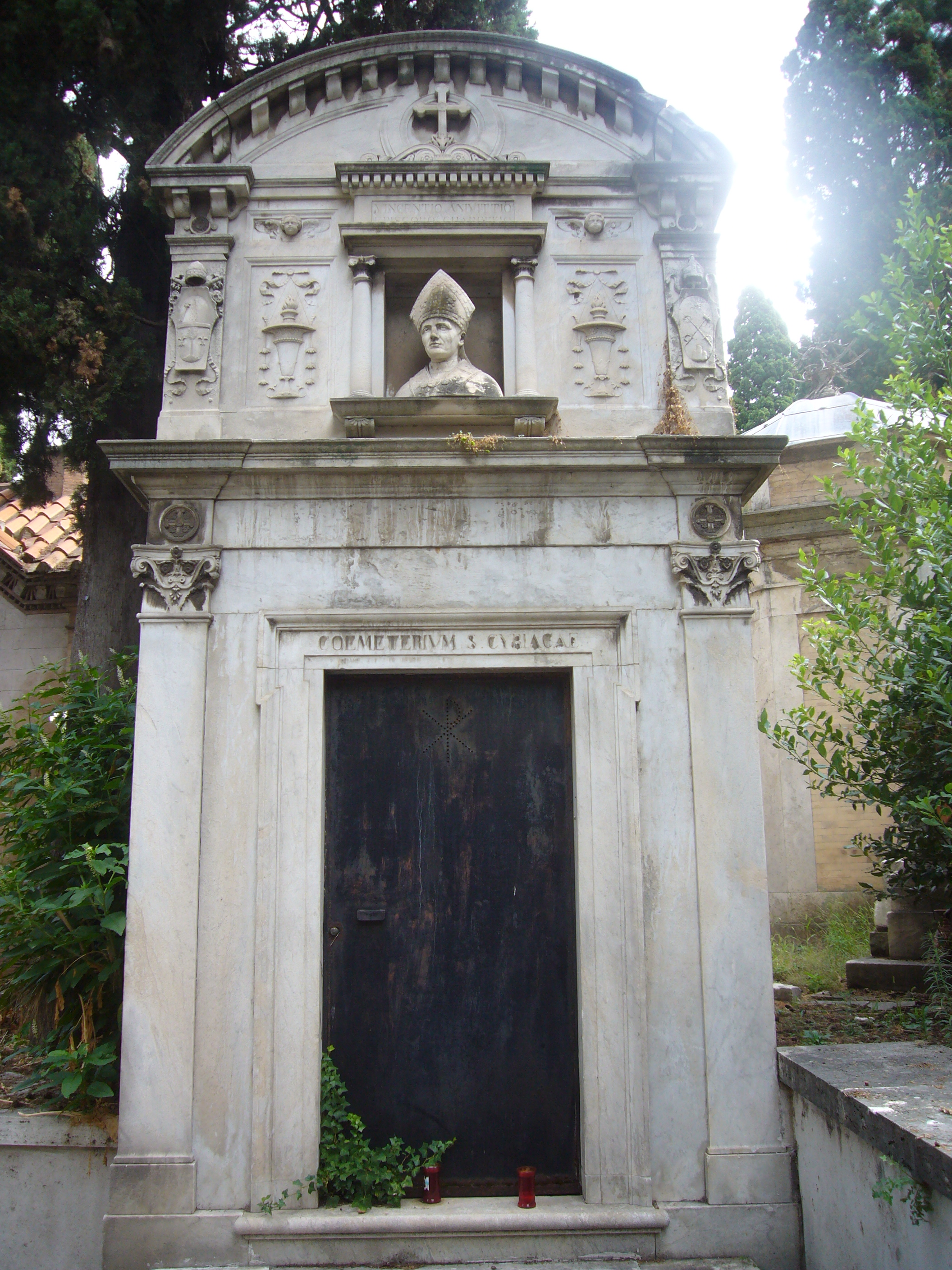 Roma, Pincetto nuovo al Verano. Coemeterium Cyriacae, ingresso dal campo Verano. Le gallerie sottostanti, rinvenute nel 1992 durante lavori di ampliamento di una tomba, pertengono presumibilmente all'omonima e nota area sepolcrale con accesso dal chiostro della basilica di san Lorenzo fuori le mura.